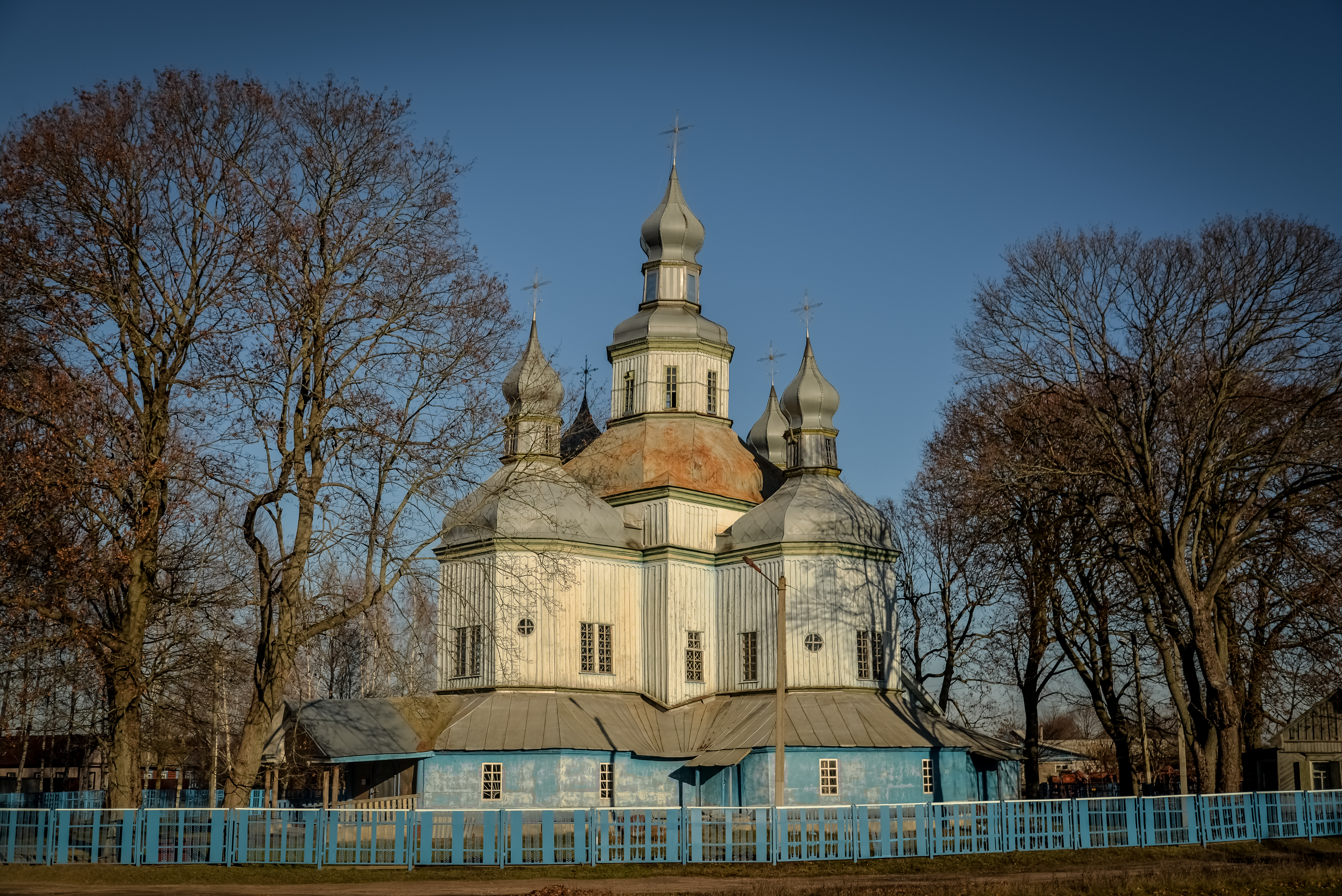 Николаевская церковь: Новый Ропск, Климовский район, Брянская область